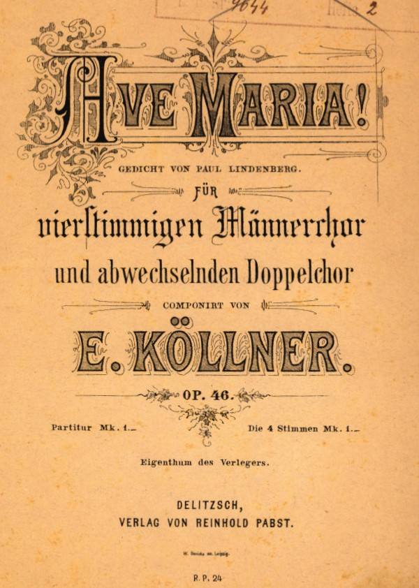 Libretto-Cover